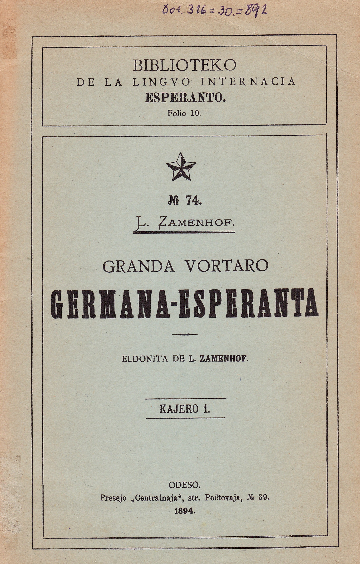 librokovrilo de "Granda Vortaro Germana-Esperanto. Kajero 1", 1894